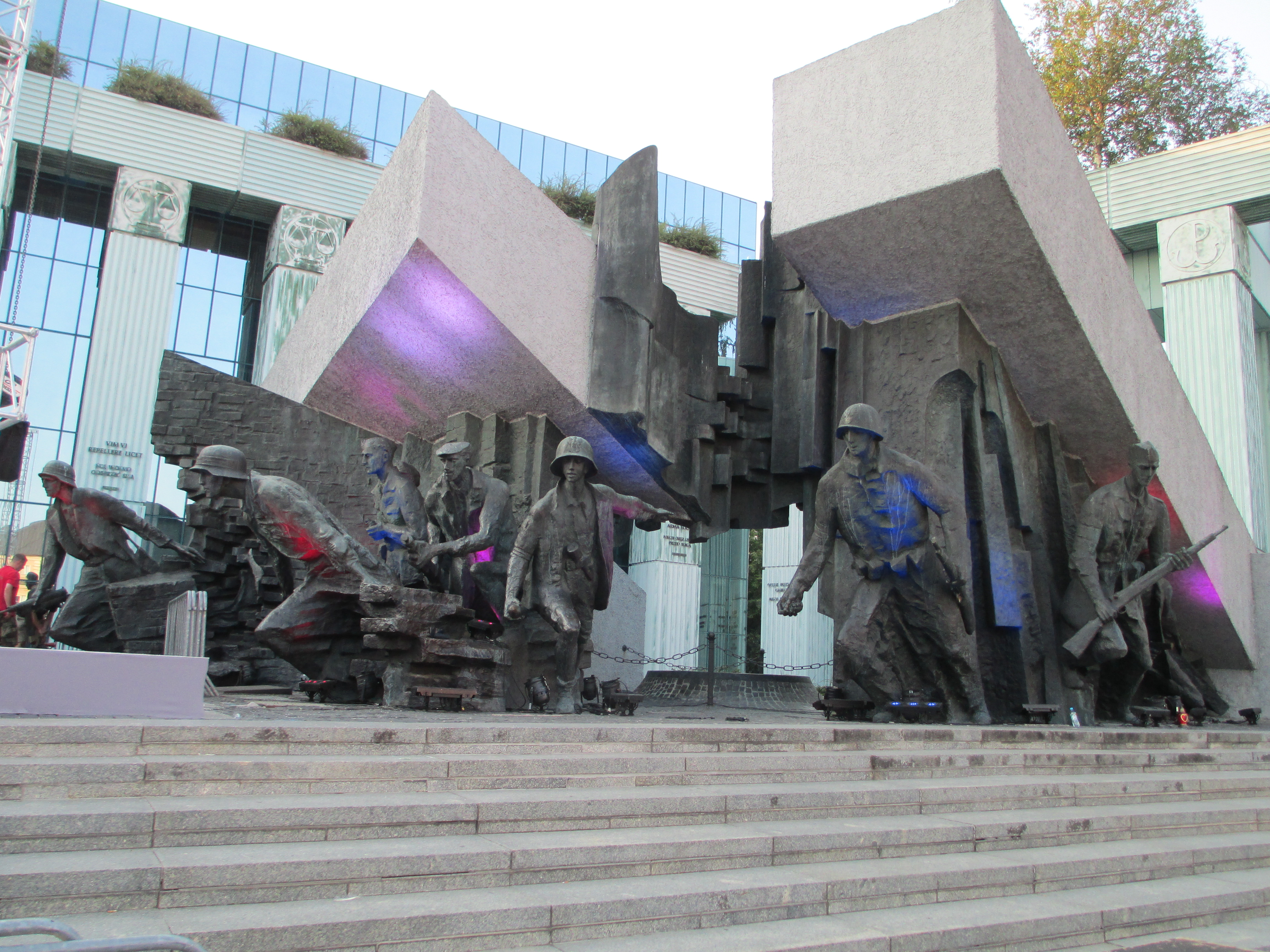 האנדרטה המרכזית למרד הפולני בוורשה ב-1944